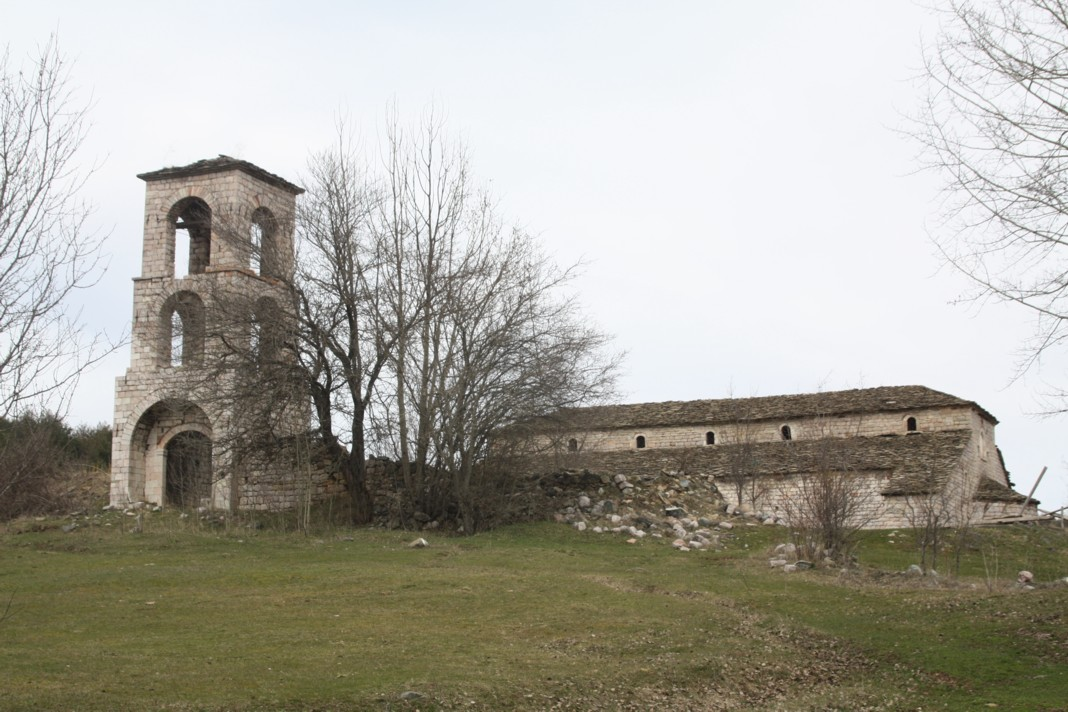 A church in Voskopojë, Albania